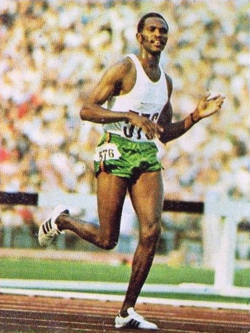 CAMPIONI dello SPORT 1973/74-Figurina n.18- KEINO -ATLETICA LEGGERA-Rec